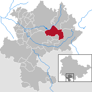 Auengrund in Thuringia - district Hildburghausen